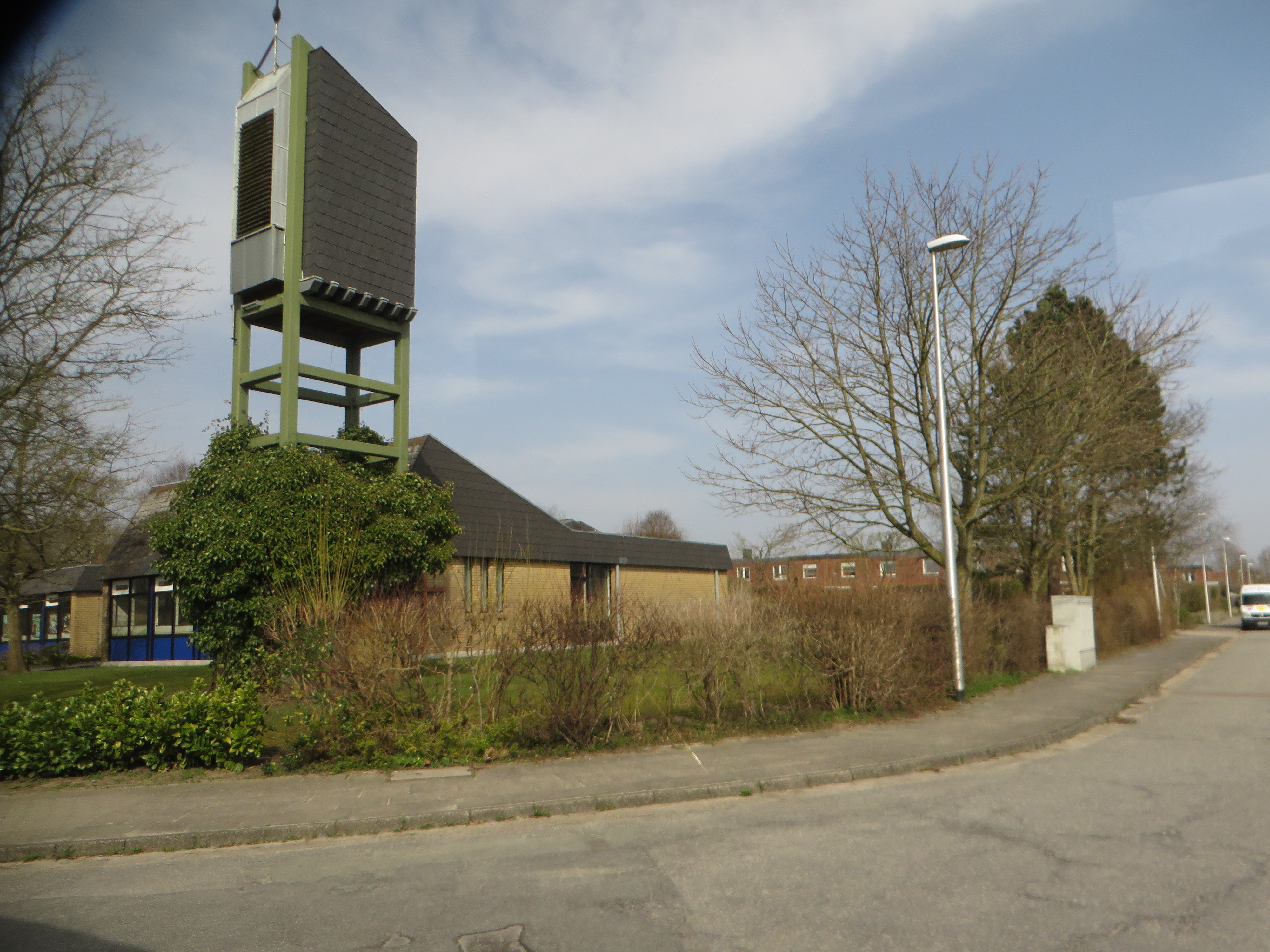 Gemeindezentrum Fruerlund (Flensburg 2018), Bild 001